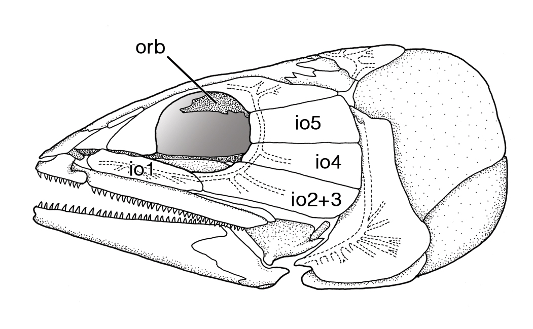 Rhacolepis skull